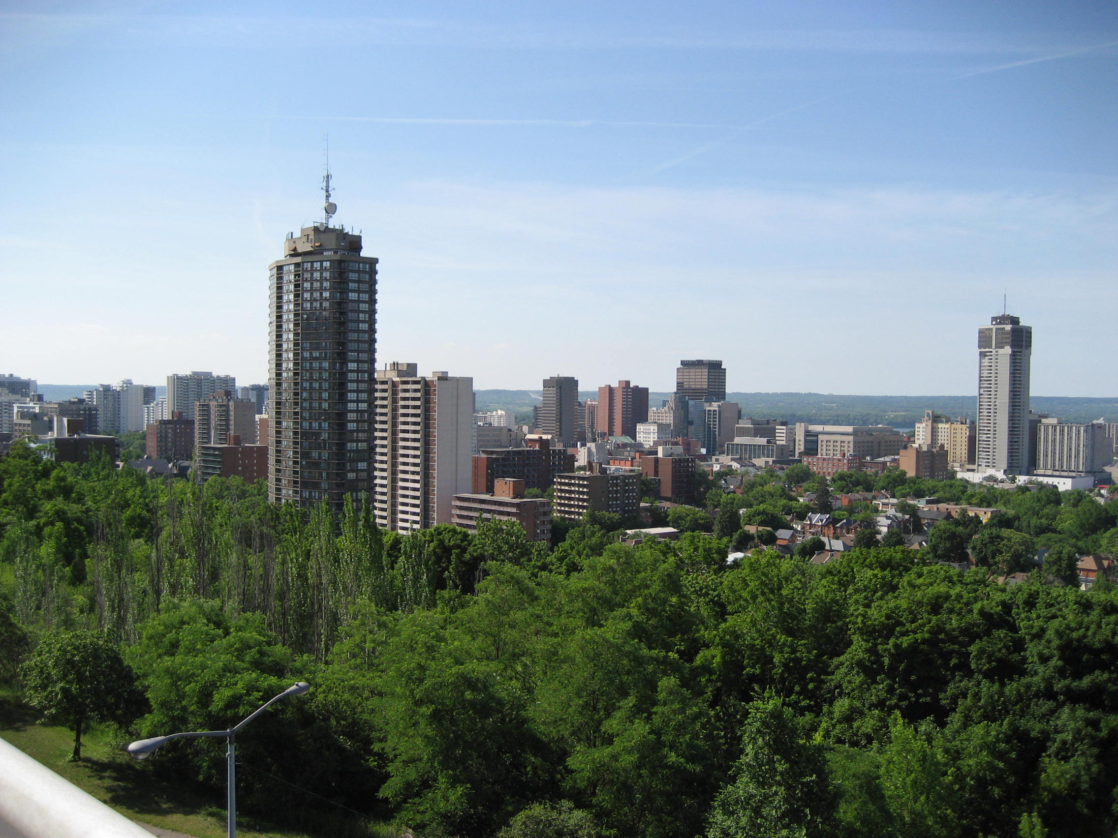 City Skyline, Hamilton, Ontario